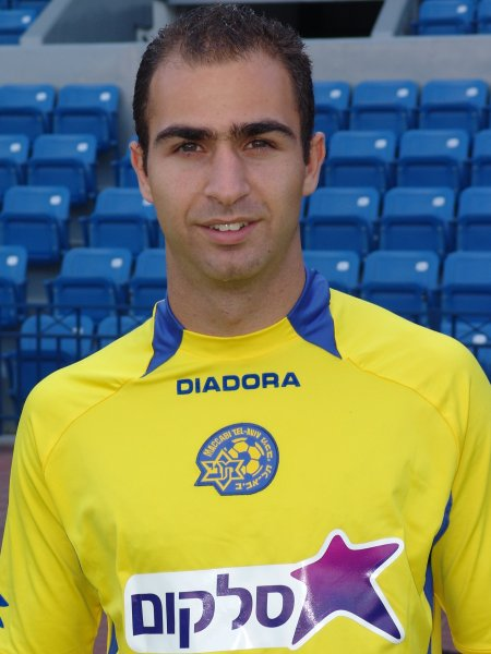 משה מישאלוף, שחקן מכבי תל אביב (Moshe Mishaluf of Maccabi Tel Aviv)